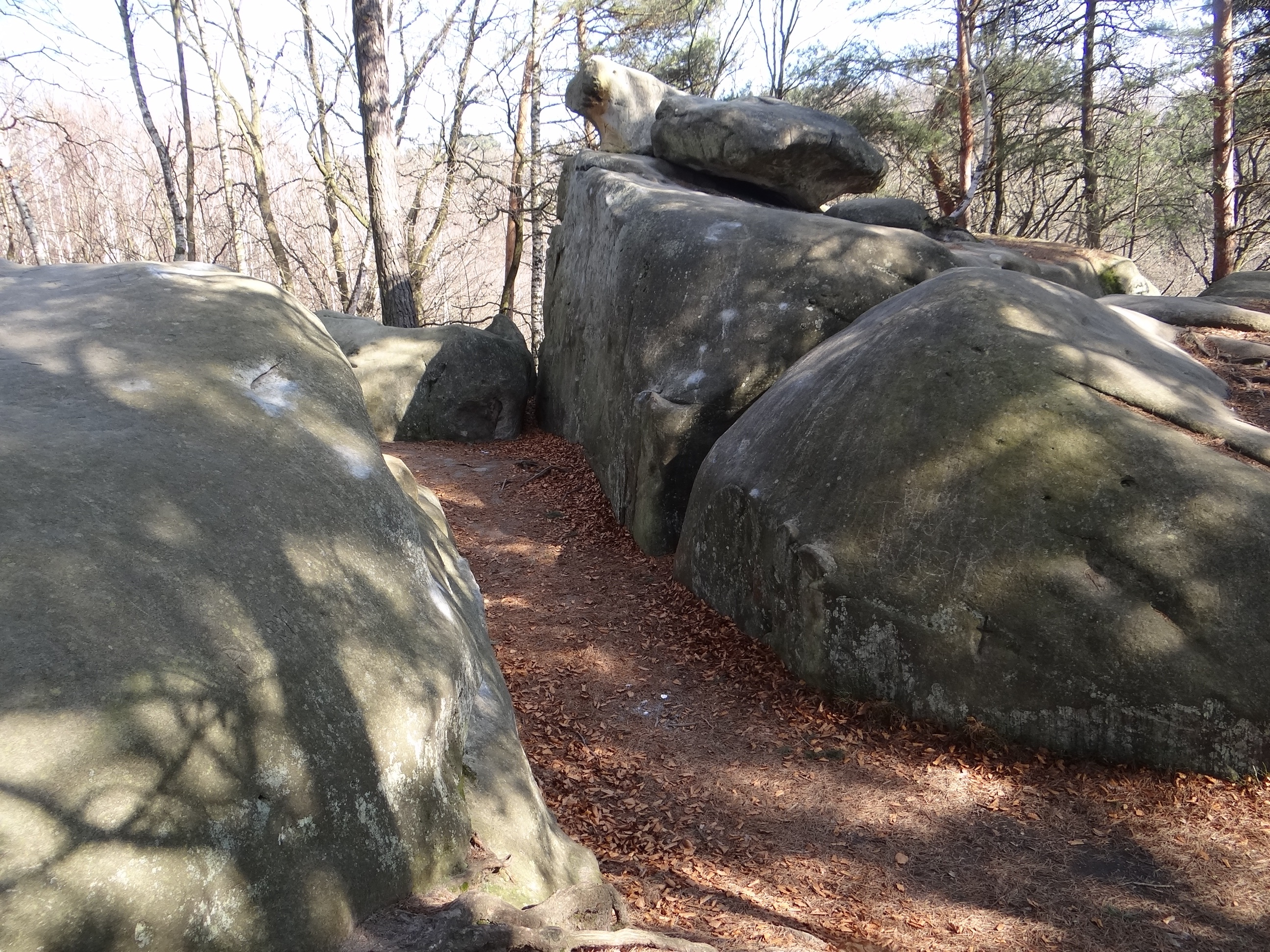 Skała Borsuk w rezerwacie przyrody skamieniałe Miasto w Ciężkowicach